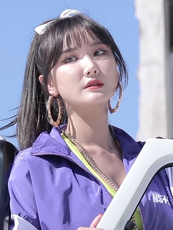 EXID 새 싱글 '내일해'···뮤직비디오 비하인드 영상 (2)